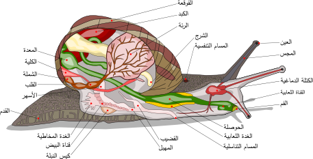 رسم بياني يُظهر تشريح الحلزون (Helix aspersa).